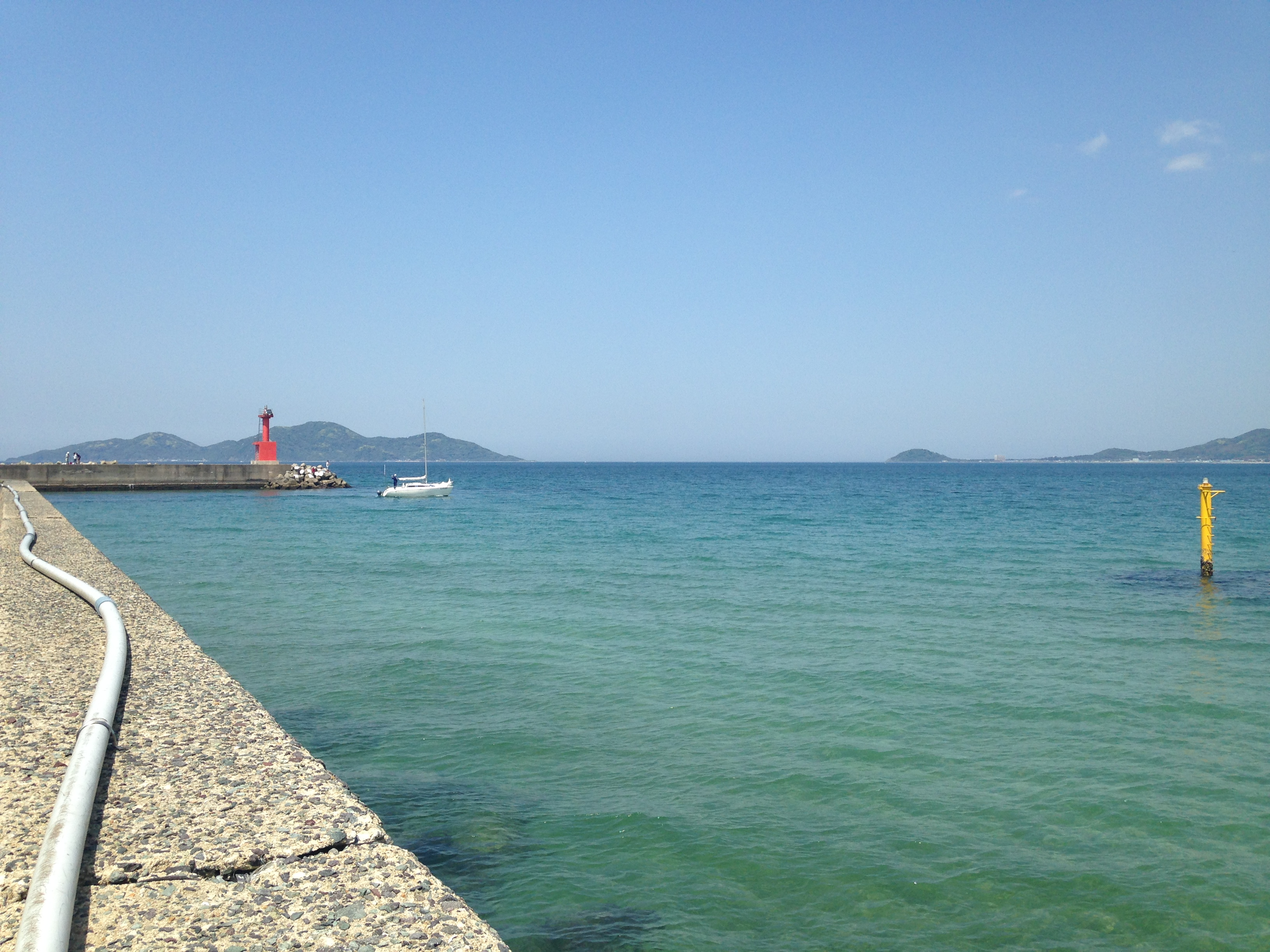 神湊港より望む地島と鐘ノ岬